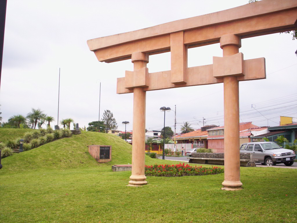 acceso sur al Parque Okayama